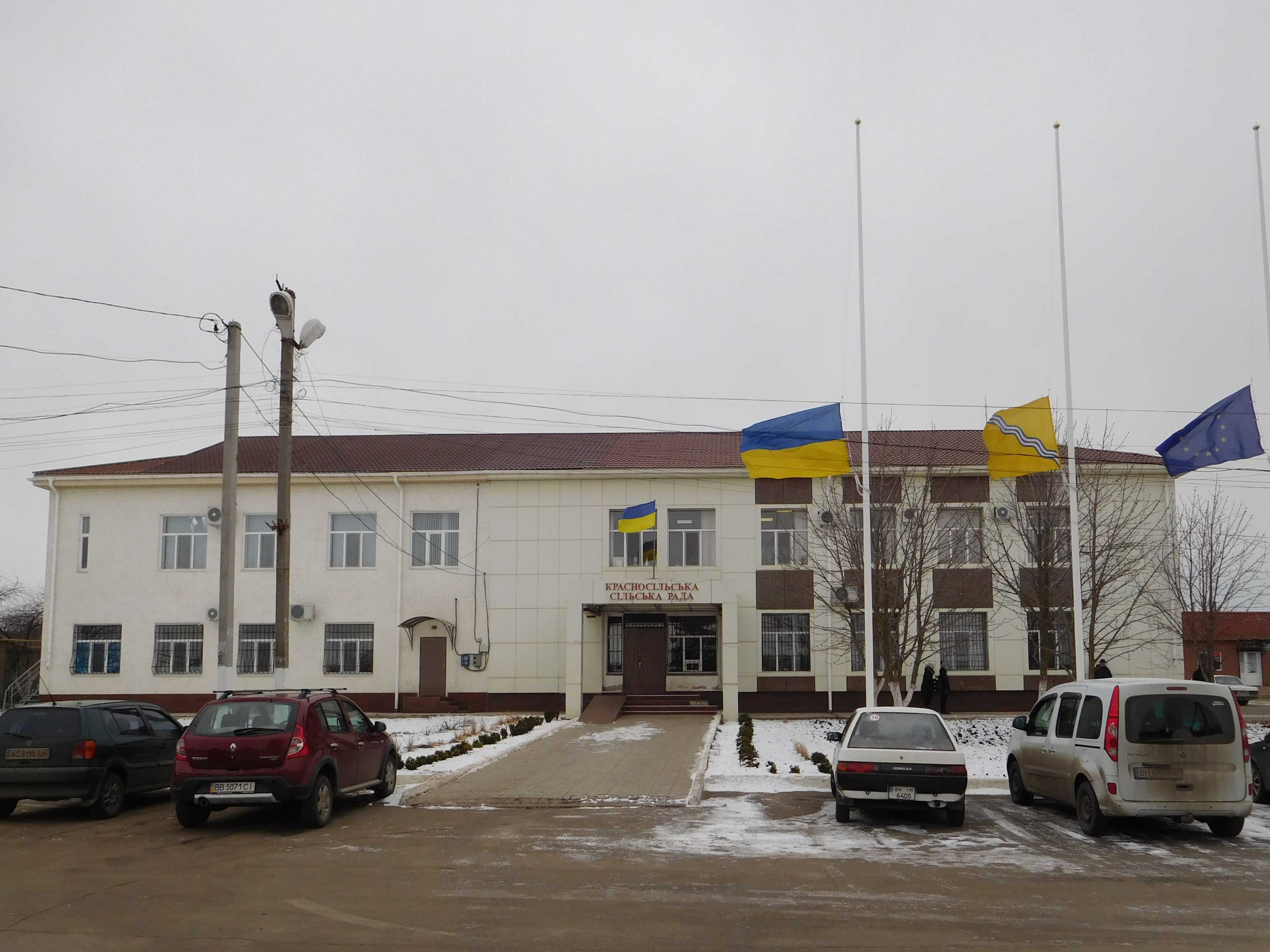 Сільська рада Красносільської громади, Лиманський район, Одеська область